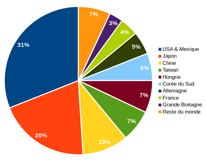 Répartition de la production mondiale de fibres de carbone par pays (données extraites de T. Kraus, M. Kühnel, E. Witten 'Composite Market Report 2015' Carbon Composites